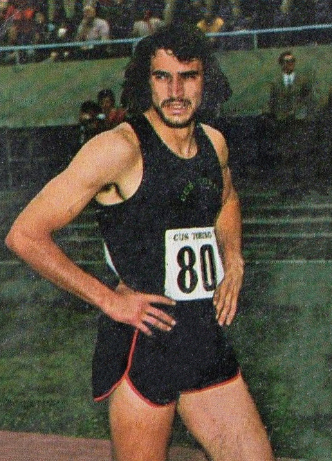 CAMPIONI dello SPORT 1973/74-Figurina n.43- FIASCONARO - SUD AF -ATL.LEGGERA-Rec